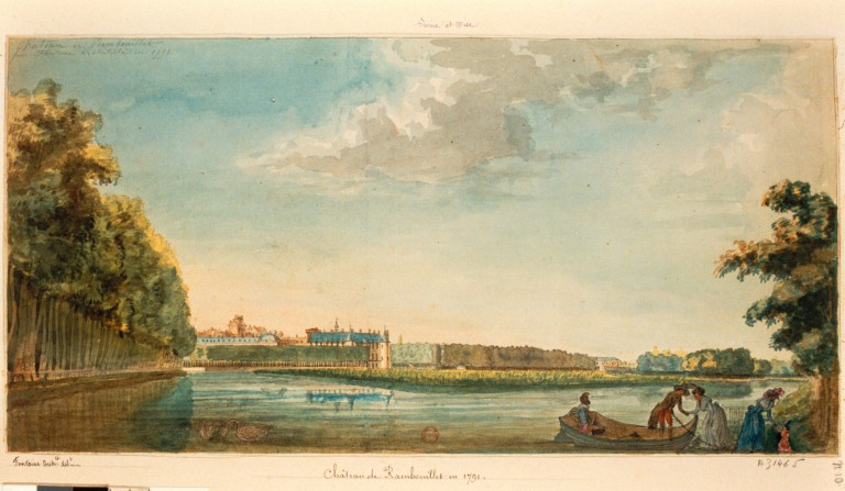 Château de Rambouillet, 1791 - Dessin de Fontaine, Pierre-François-Léonard (1762-1853)